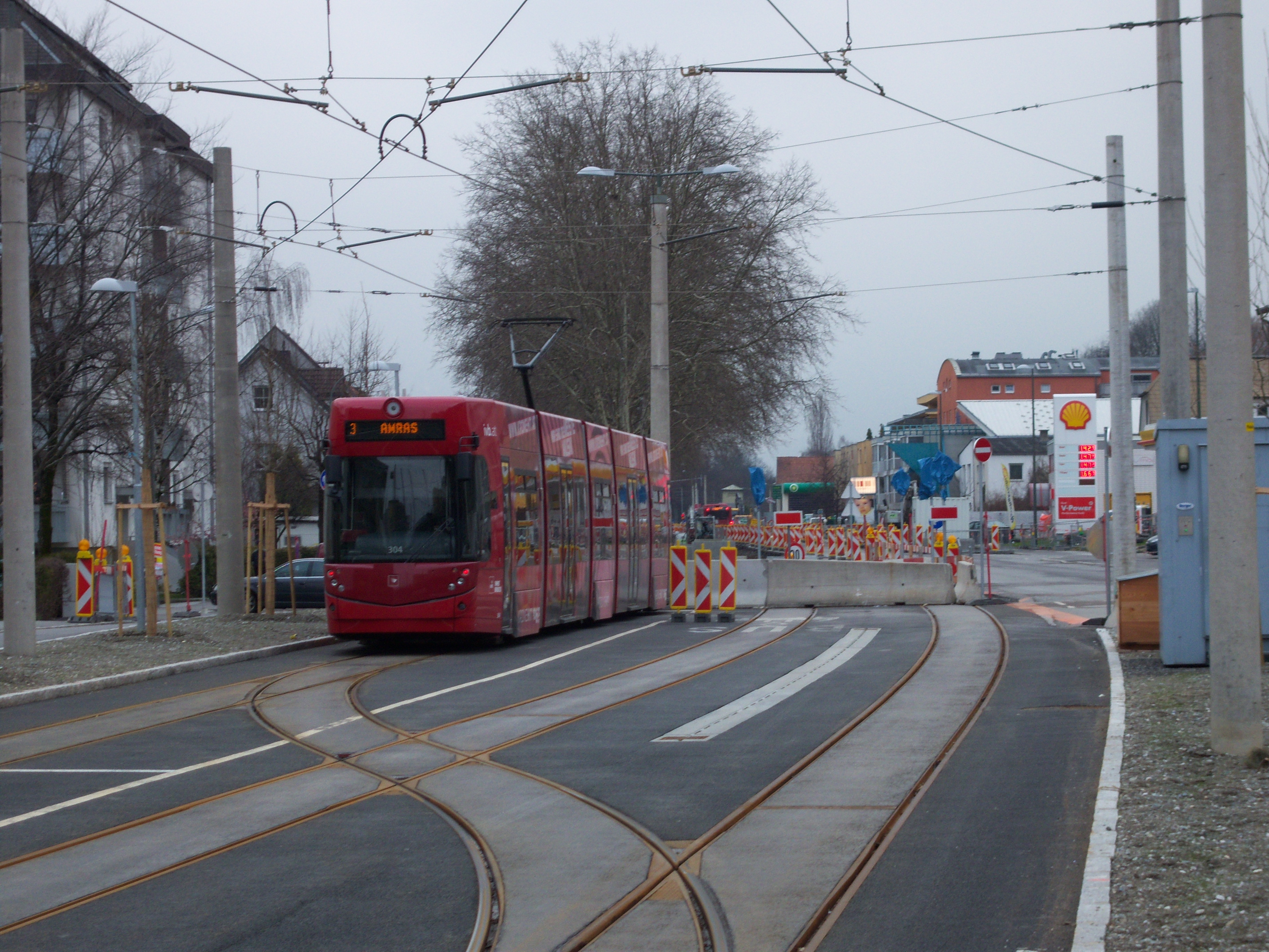 Innsbrucker Straßenbahnlinie 3 in der Endstelle "Höttinger Au-West", dahinter erkennbar die Bauarbeiten für die weitere Verlängerung Richtung Westen